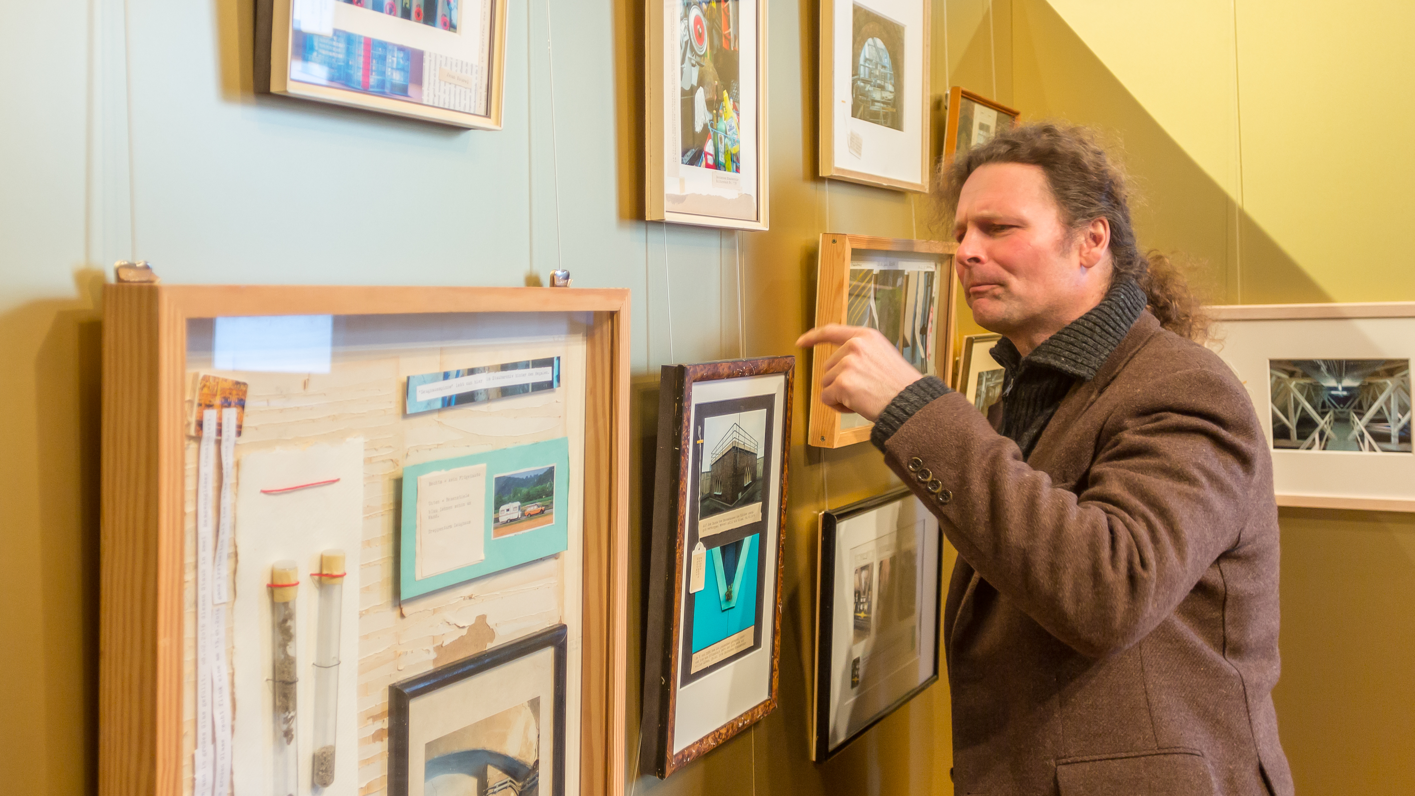 Ausstellung „Unter Kölner Dächern – Kölner Staub als Objektkunst und Fotografie“ im Goldenen Kubus des Kölnischen Stadtmuseums, 11. März bis 5. Juni 2016. Deutsches Staubarchiv, Wolfgang Stöcker